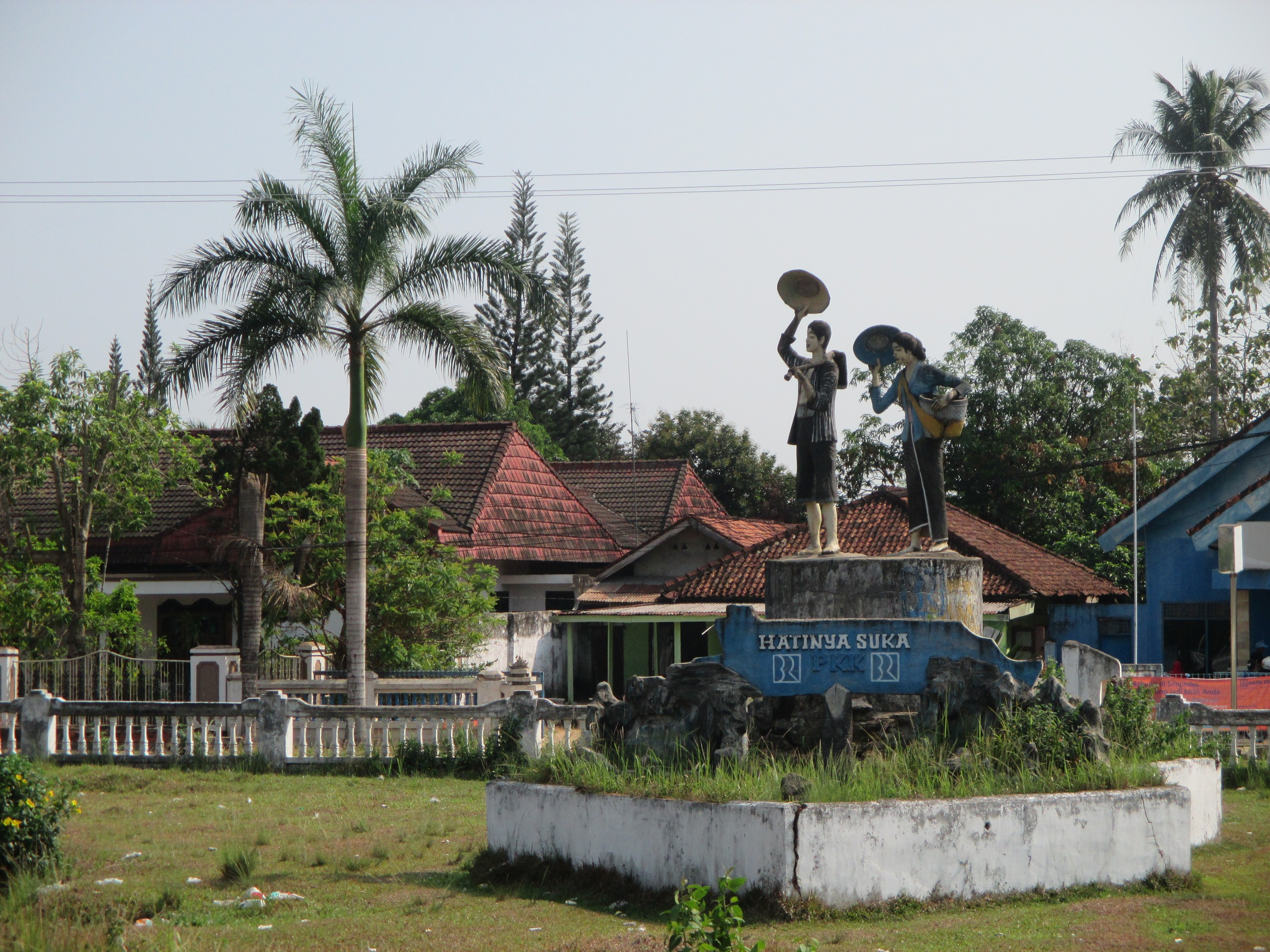 Tugu Tani sebagai icon Kecamatan Purbolinggo yang menandakan bahwa mata pencaharian penduduknya adalah pada sektor Pertanian